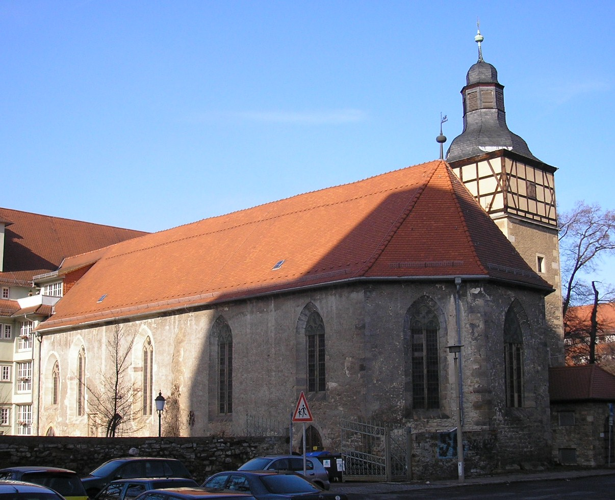 Die Hospitalkirche in Erfurt (Thüringen).